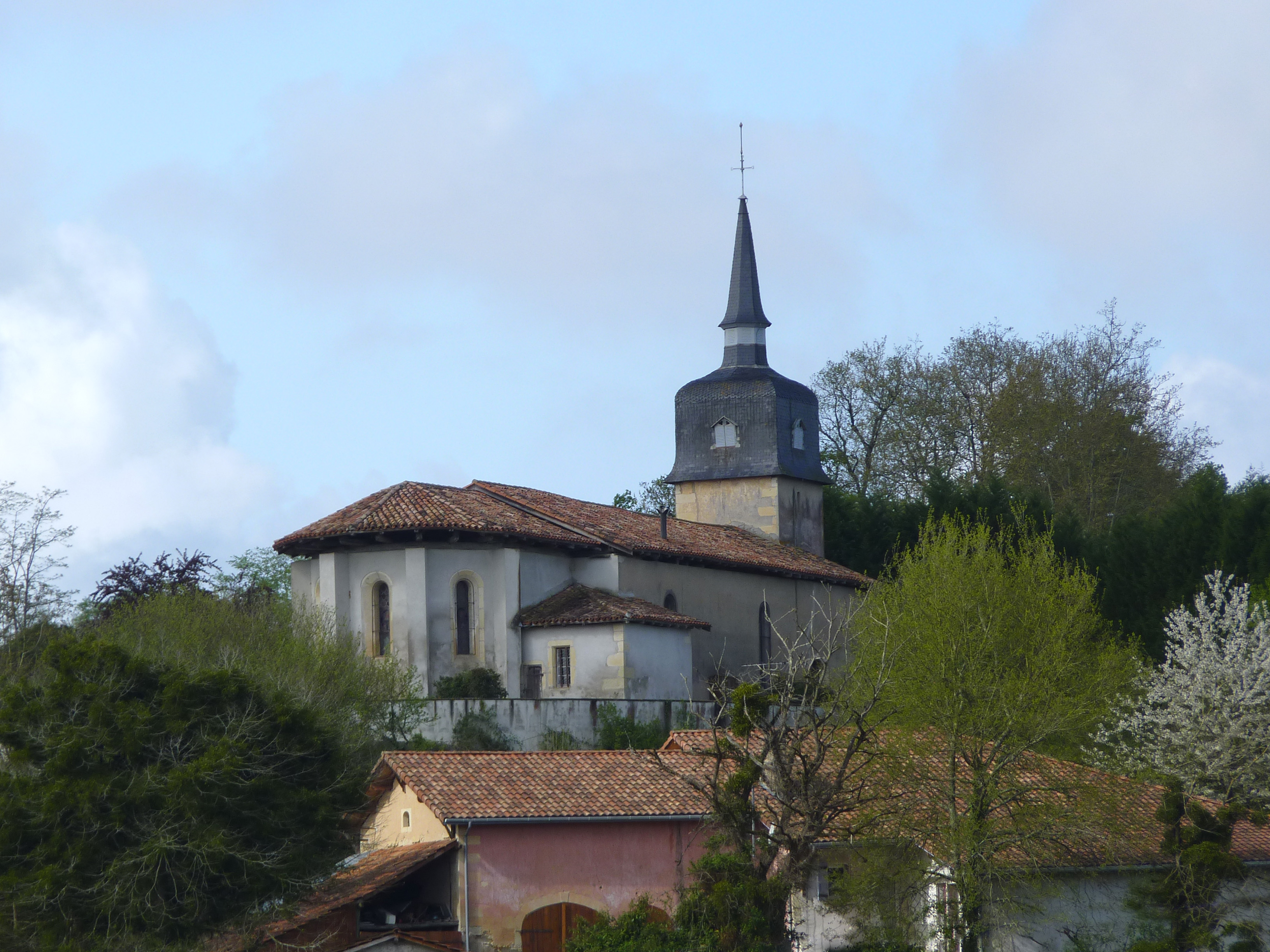 Eglise Saint-Étienne de Nousse